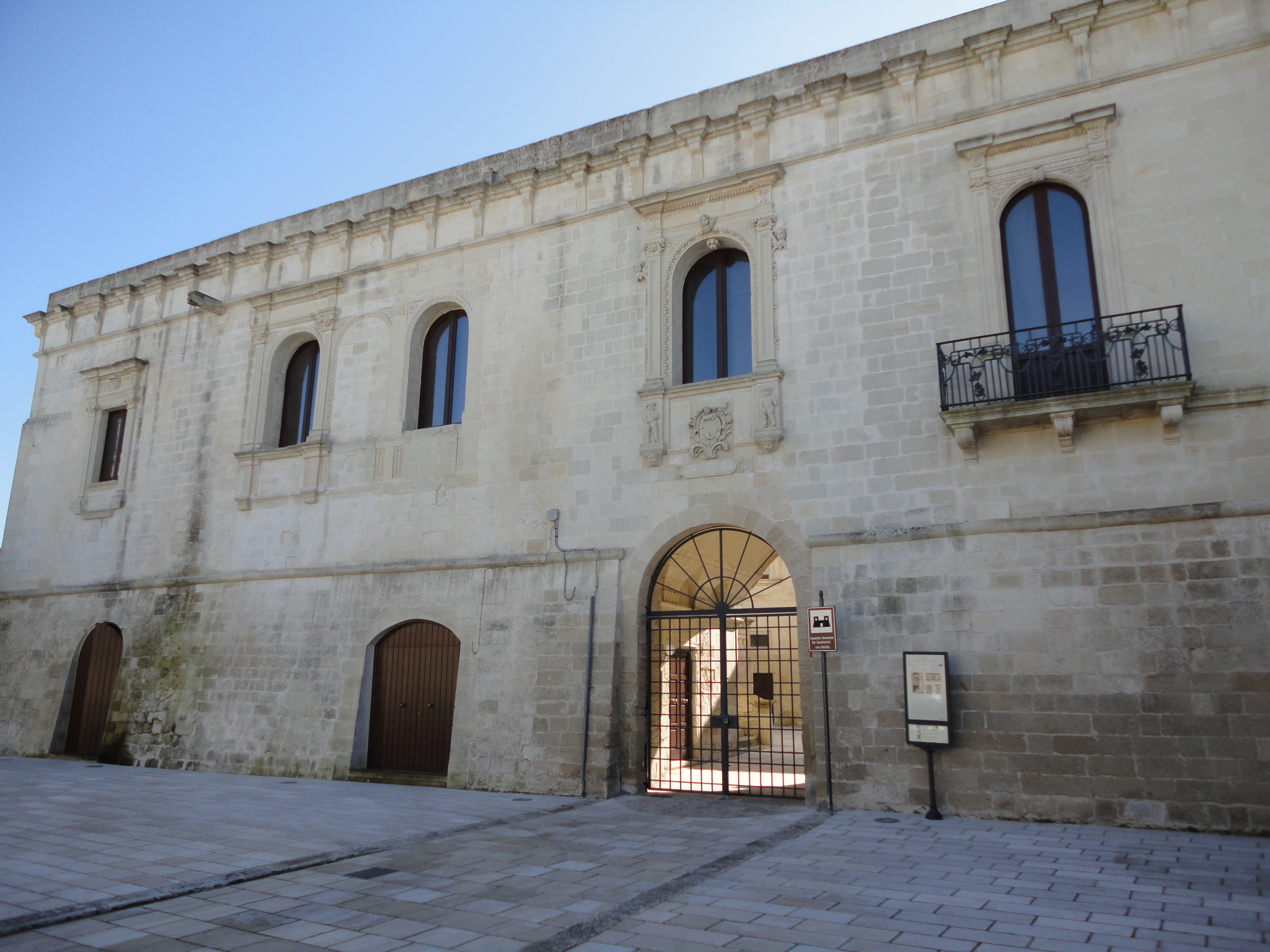 Castello 1 di Castrignano de' Greci